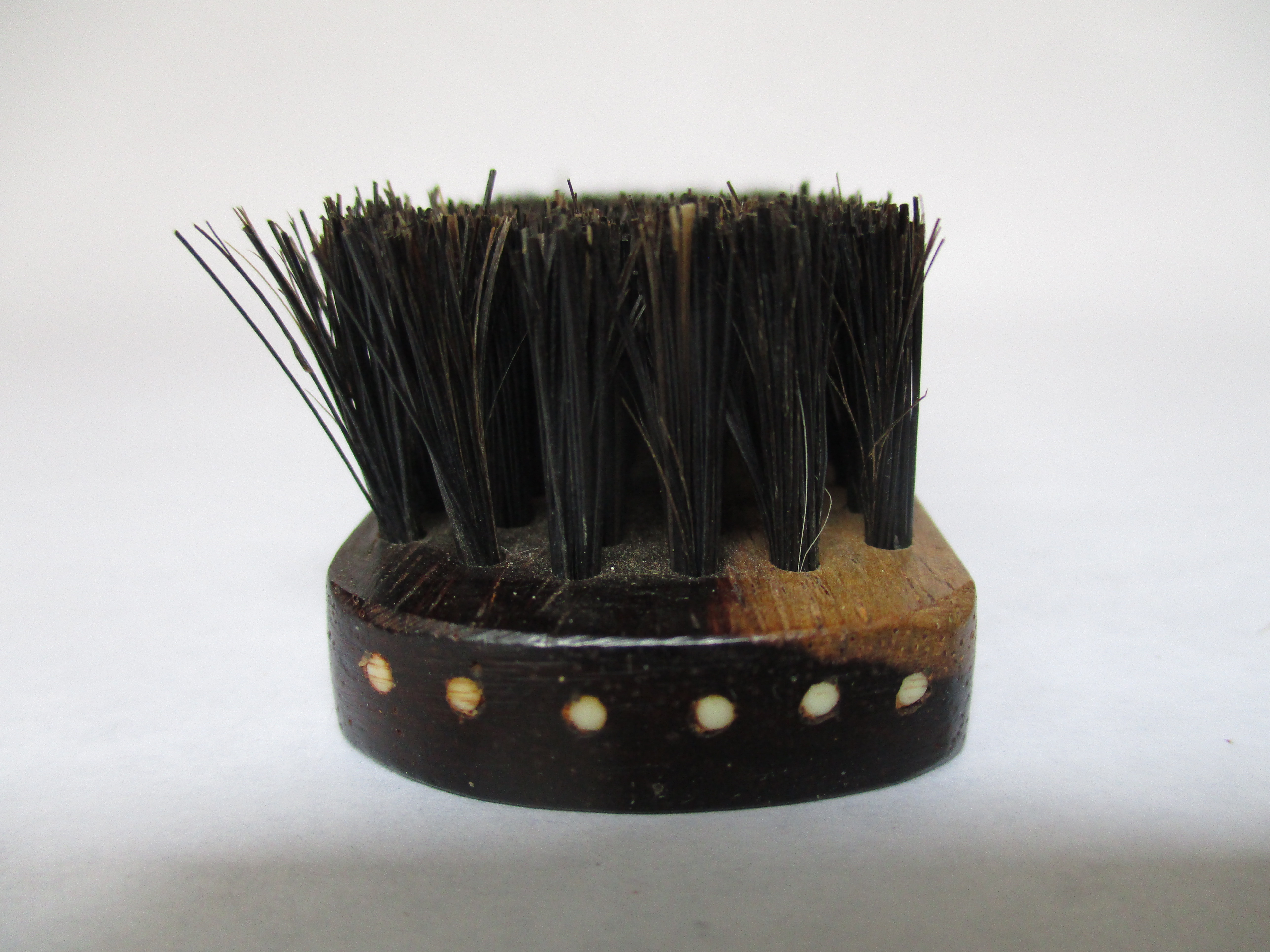 Avant d'une brosse à habits en soies de porc et ébène montée main avec trous de montage apparents bouchés en blanc